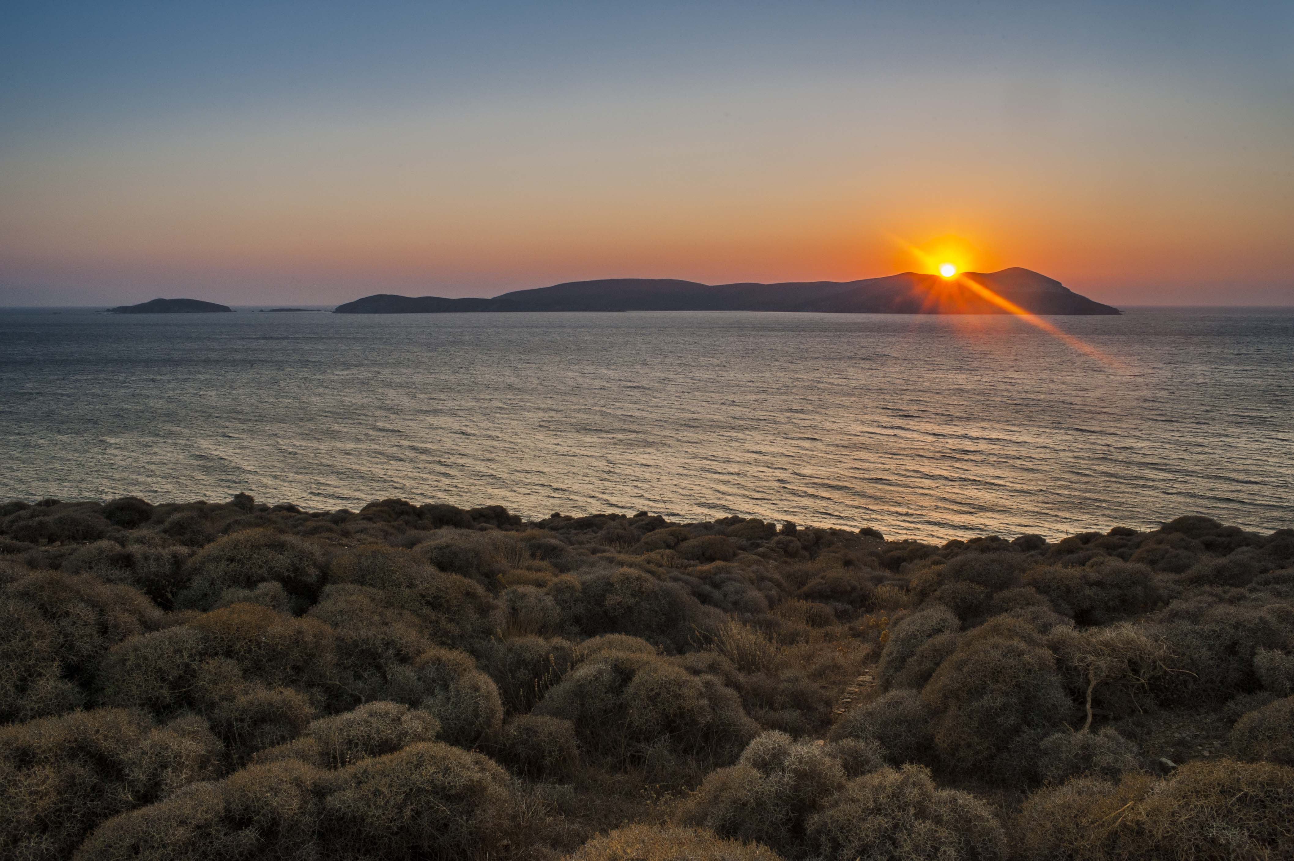 Ηλιοβασίλεμα στα Αντιψαρά.